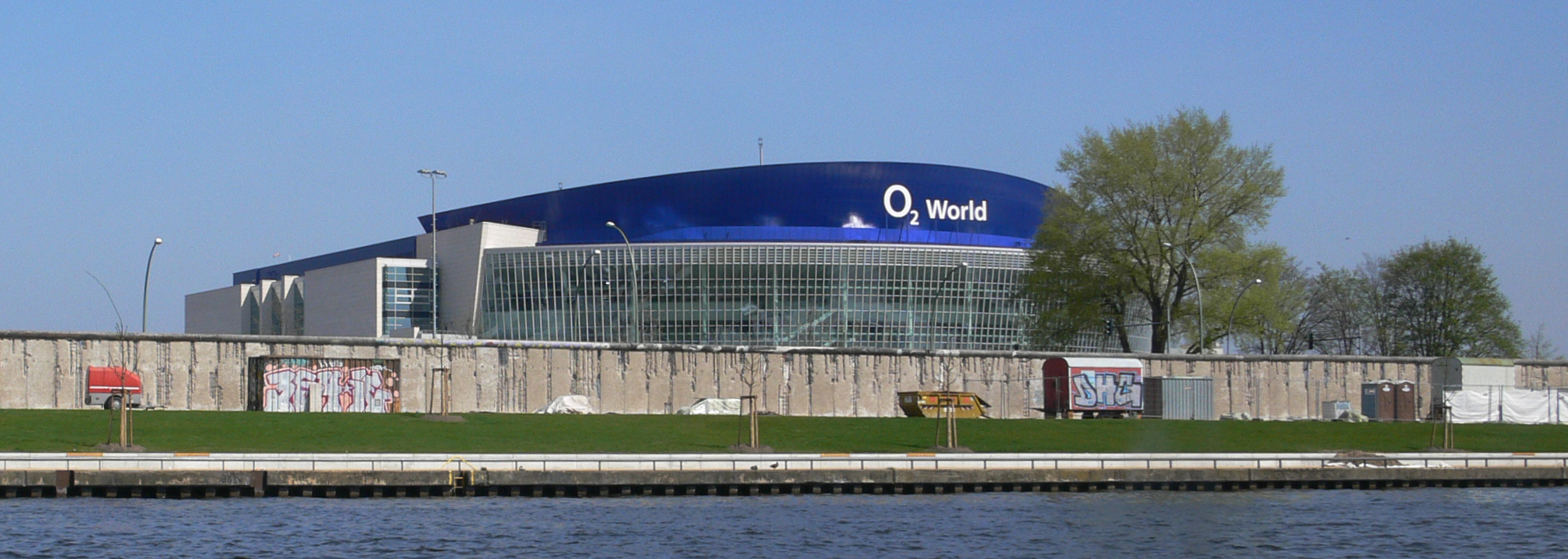 O2 World, von der Spree aus gesehen